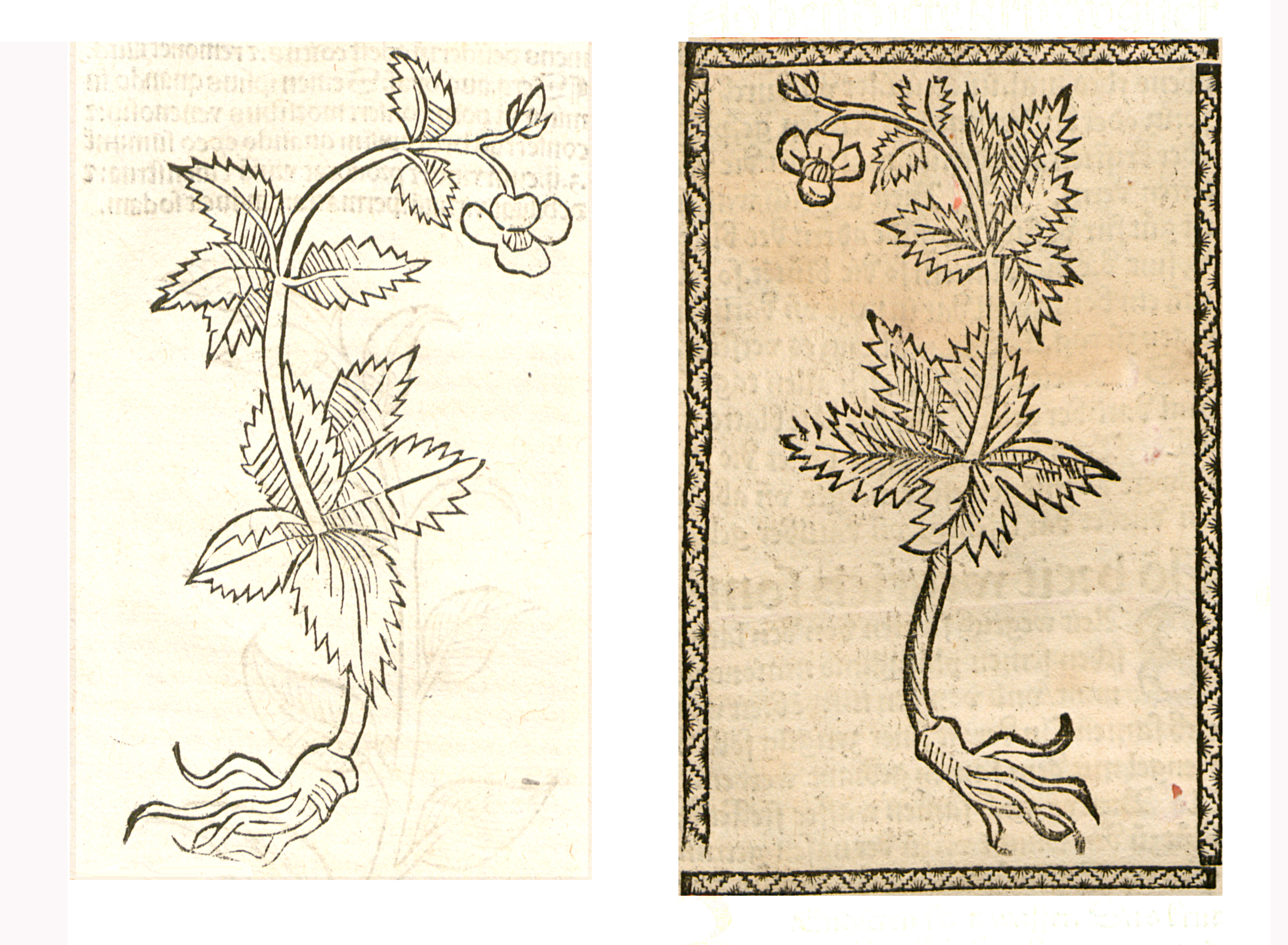 Abbildung von Benedicten (Geum urbanum)